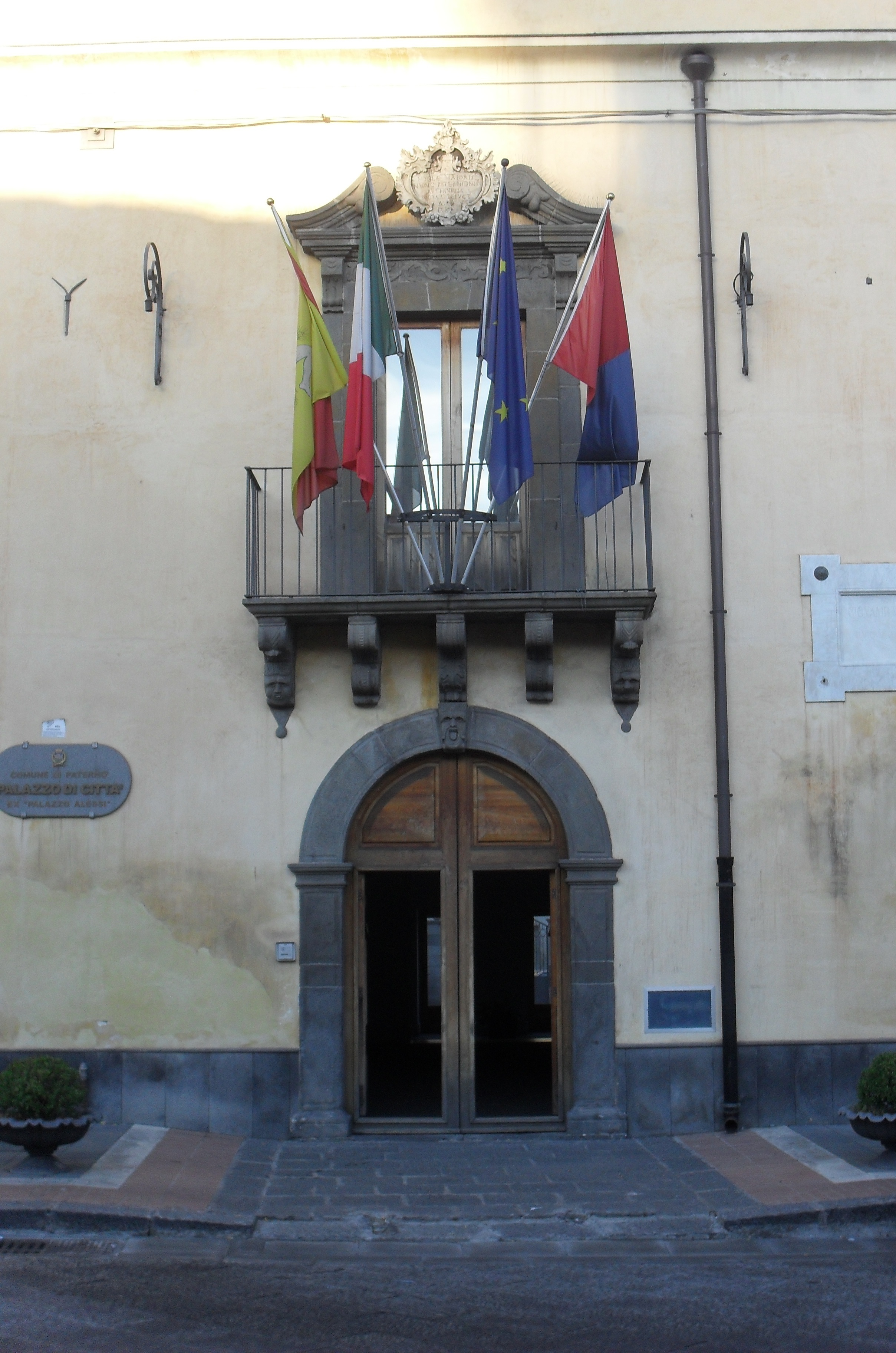 Porta principale di Palazzo Alessi, sede istituzionale del Comune di Paternò (CT)